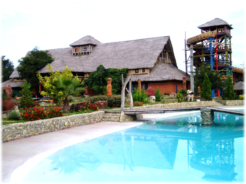 Parque Garza roja cerca de Guayaquil